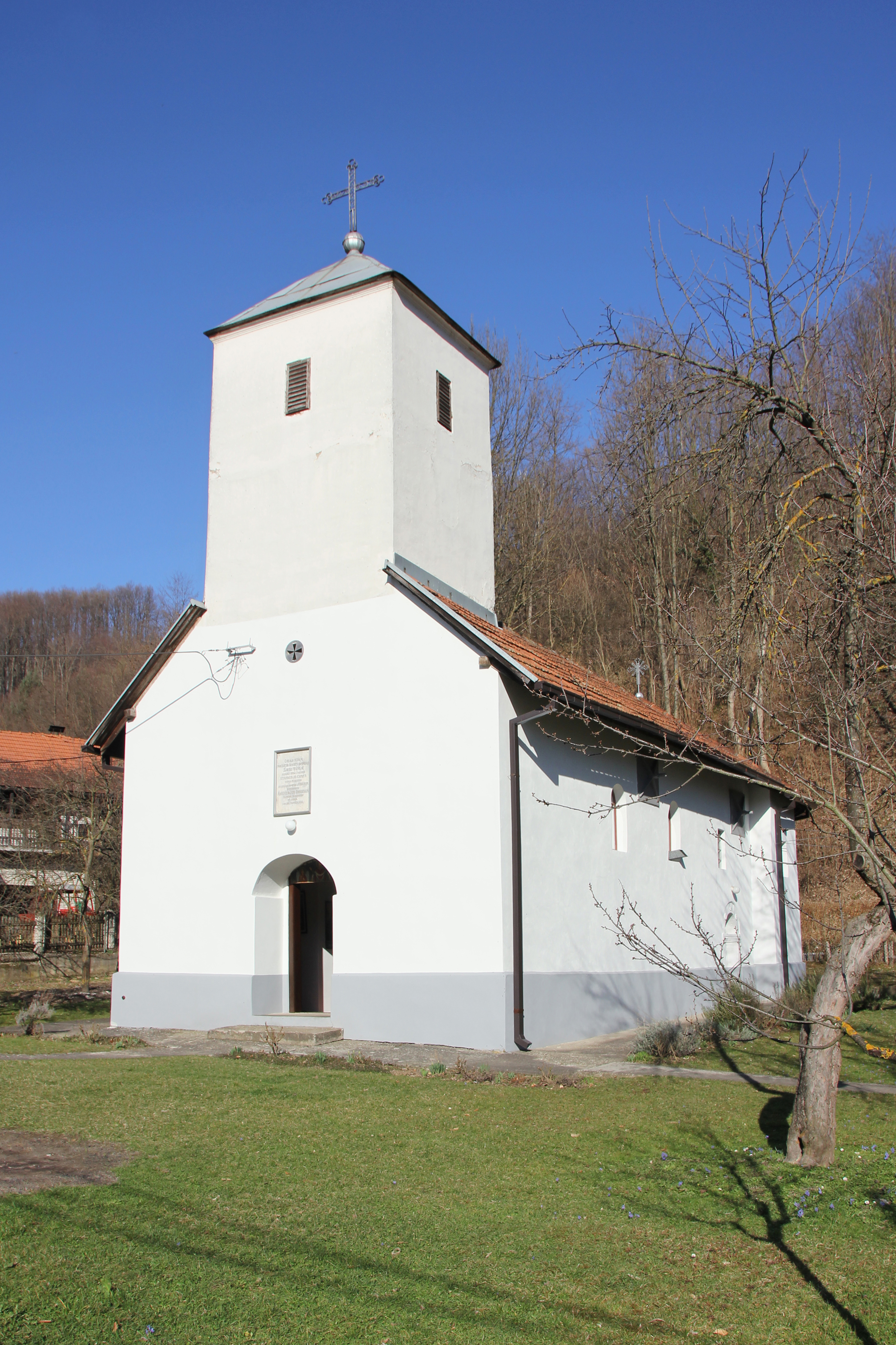 Gornji Banjani